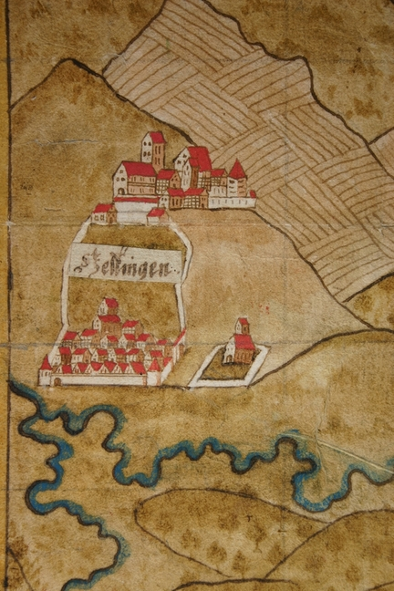 Ortsansicht Hettingen, Ausschnitt aus der Hohenzollern-Hechingischen Landkarte (Signatur: Staatsarchiv Sigmaringen K I Z/2), Staatsarchiv Sigmaringen